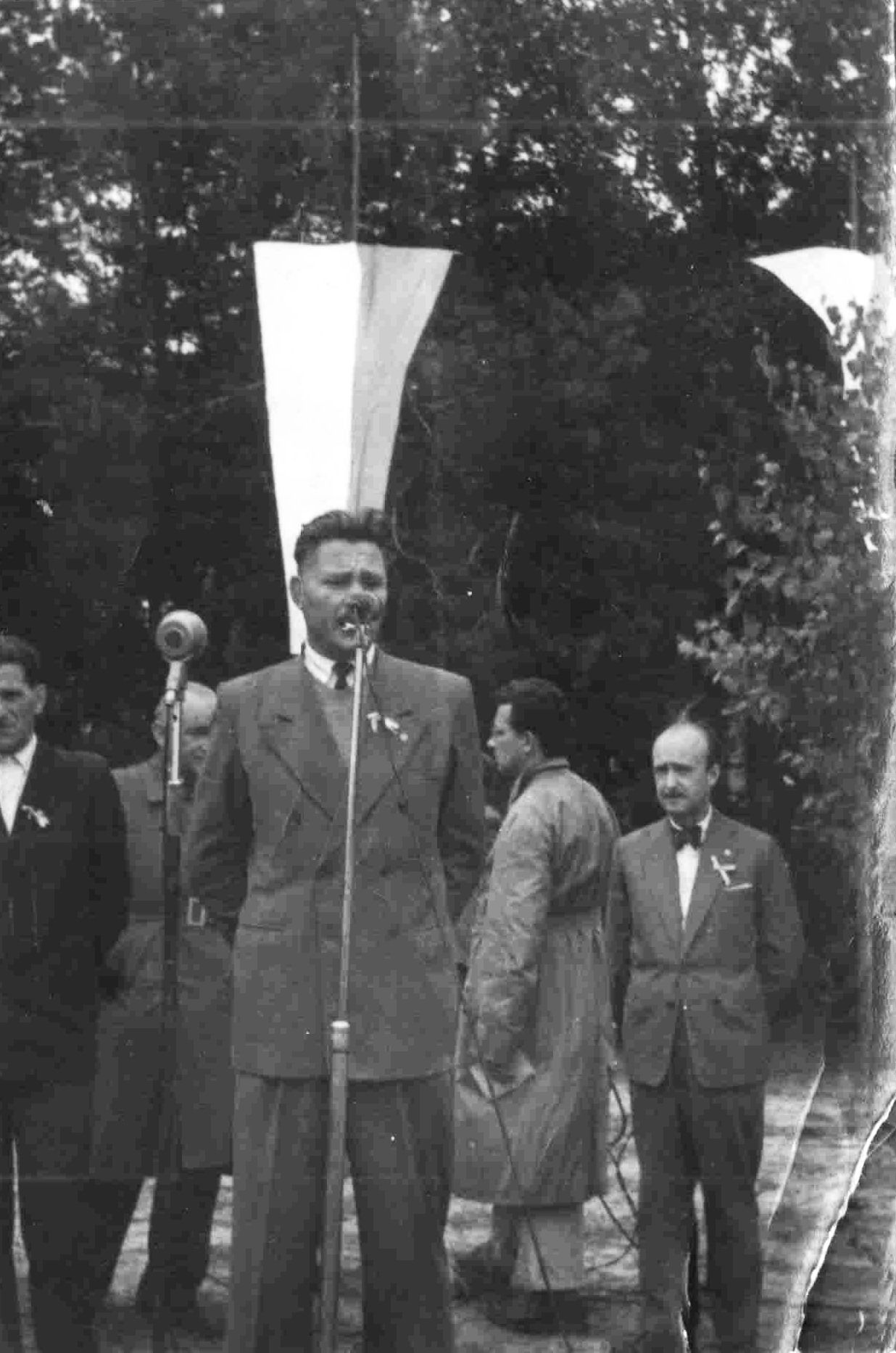 Płk.Jerzy Strzałkowski przemawia podczas odsłonięcia pomnika POS"Jerzyki" w 1957 r. we wsi Pociecha w Puszczy Kampinoskiej